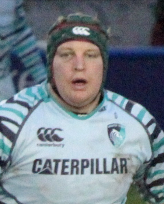 Harlequns vs Tigers 2013